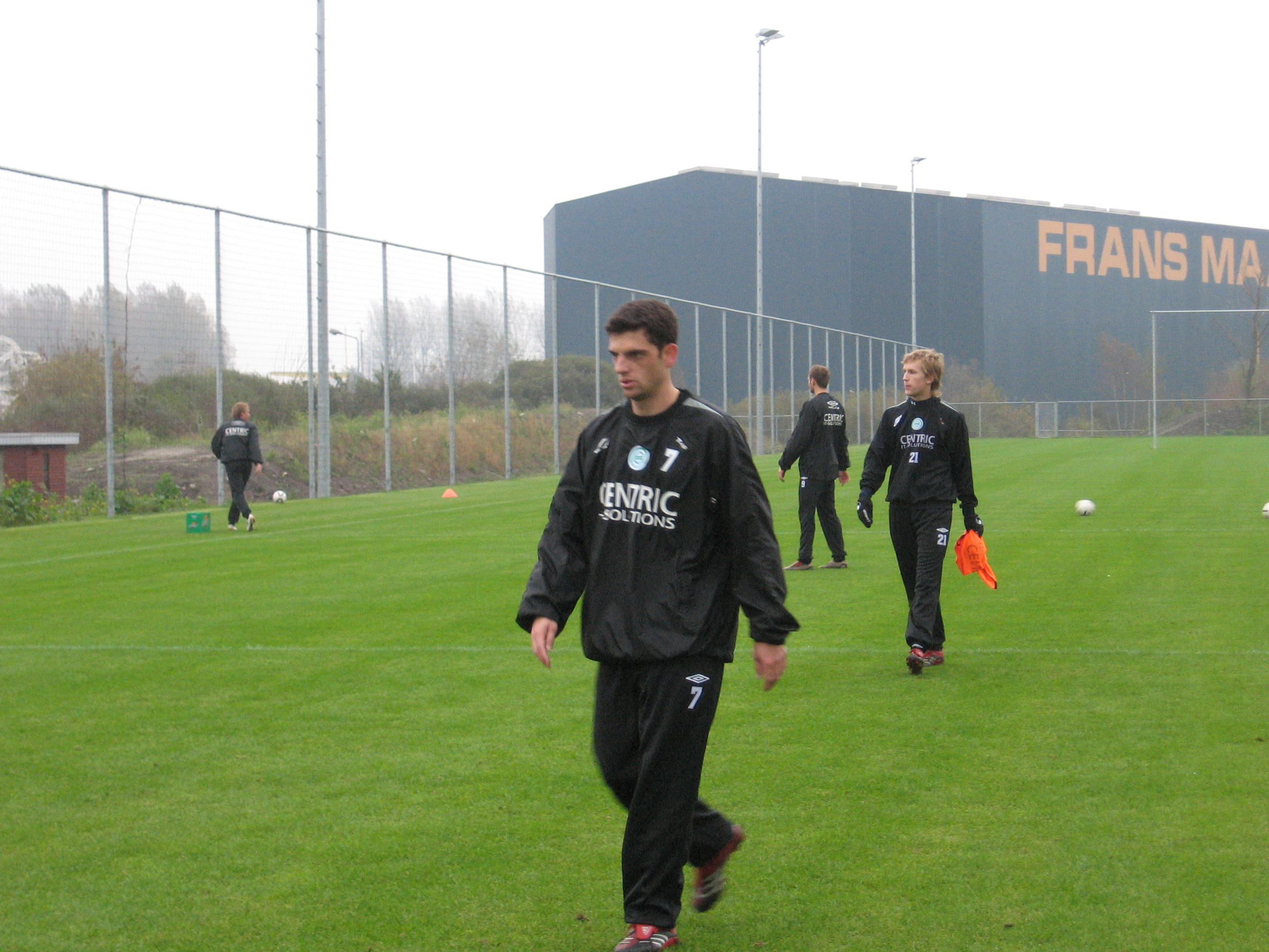 FC Groningen-speler Bruno Silva